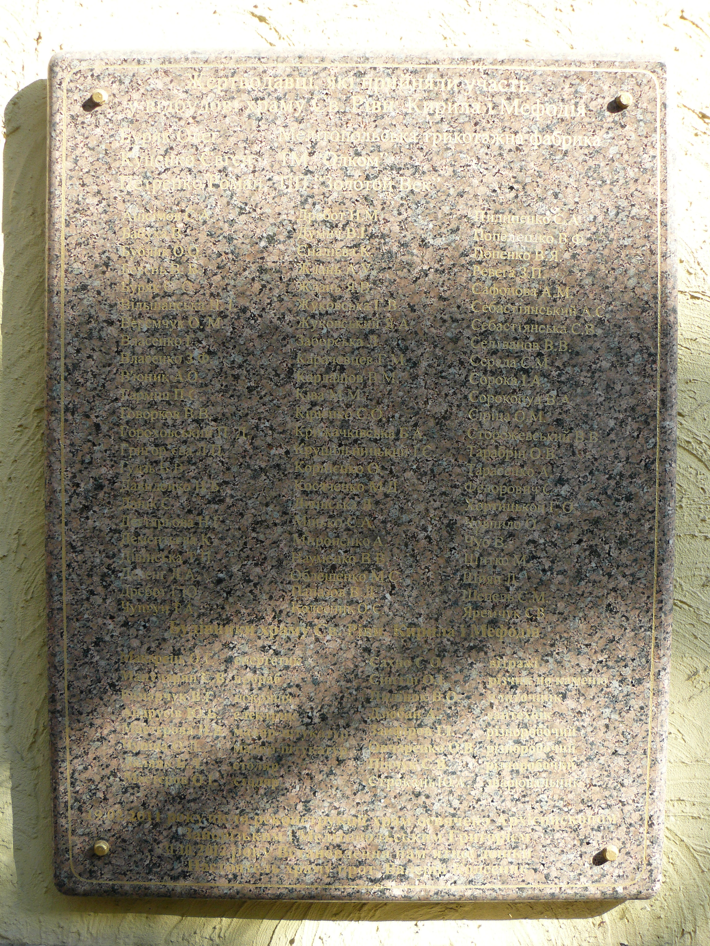 Табличка на храме Кирилла и Мефодия, Мелитополь